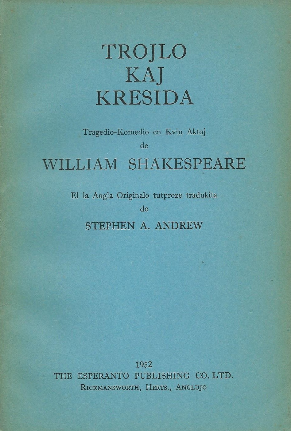 librokovrilo de "Trojlo kaj Kresida", 1952